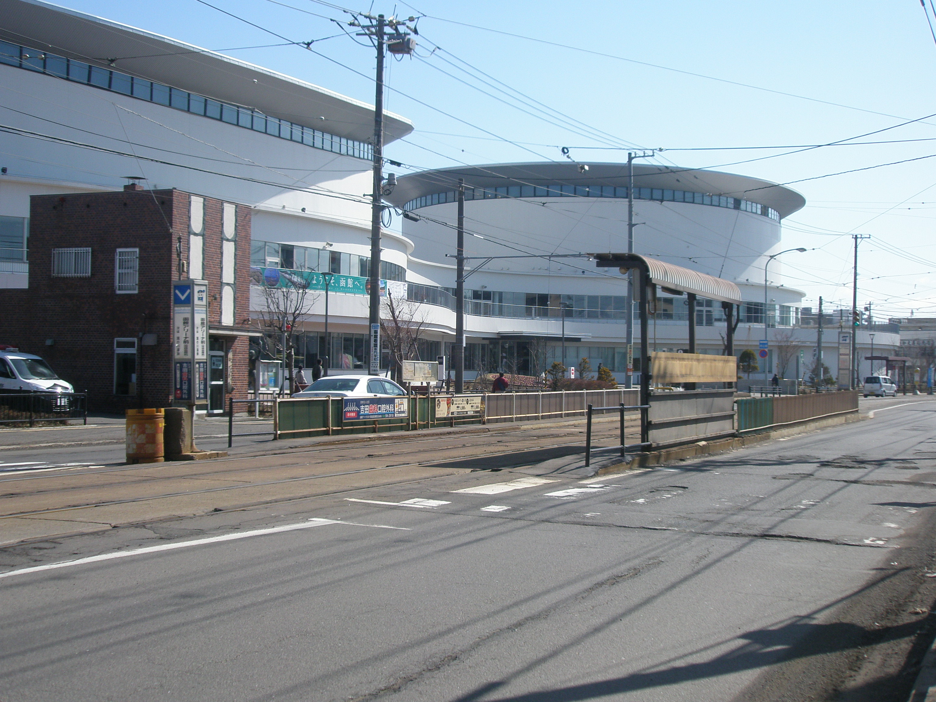 函館アリーナ前停留場・全景（2018年3月24日撮影）